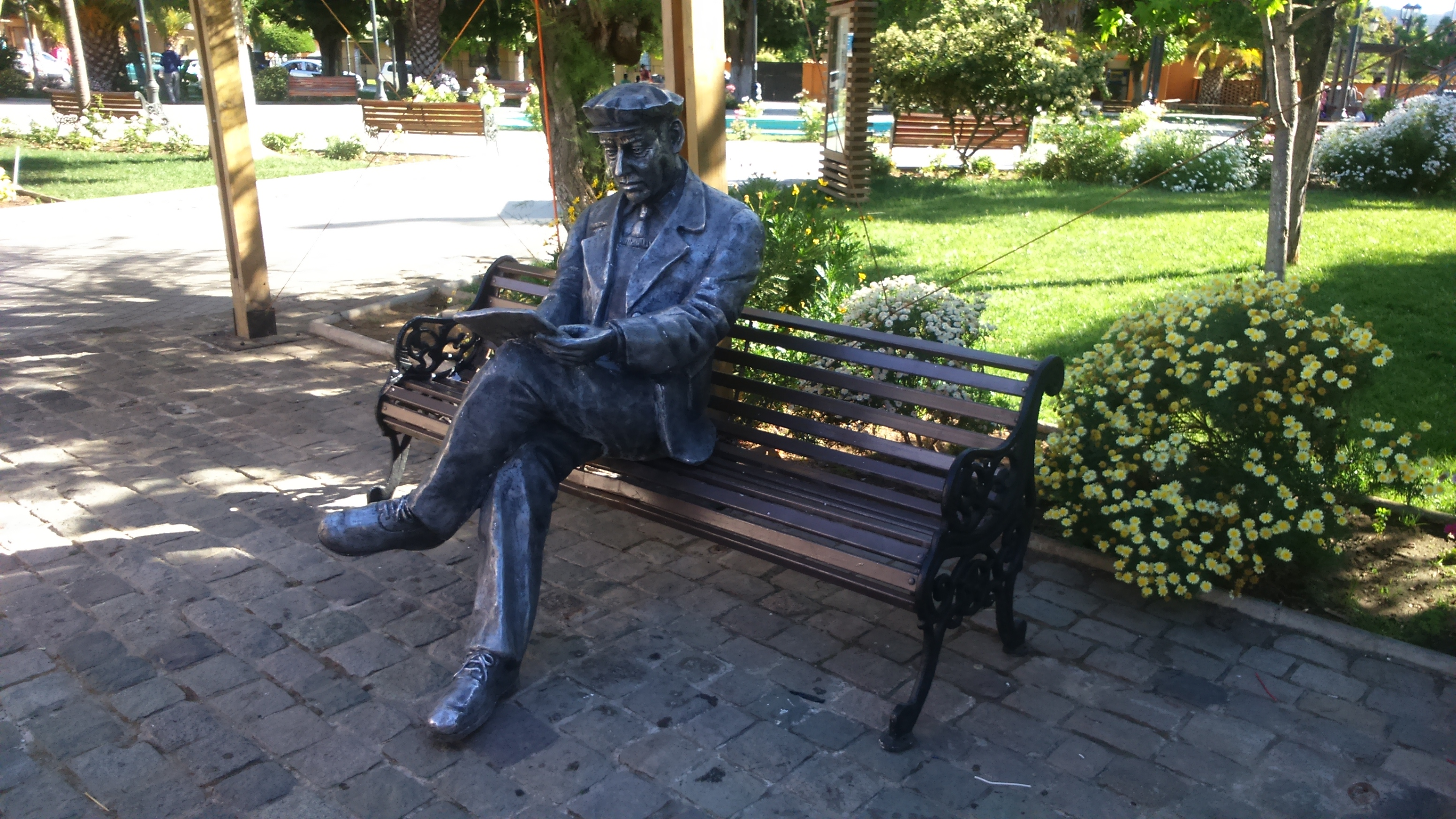 Premio Nacional de Literatura